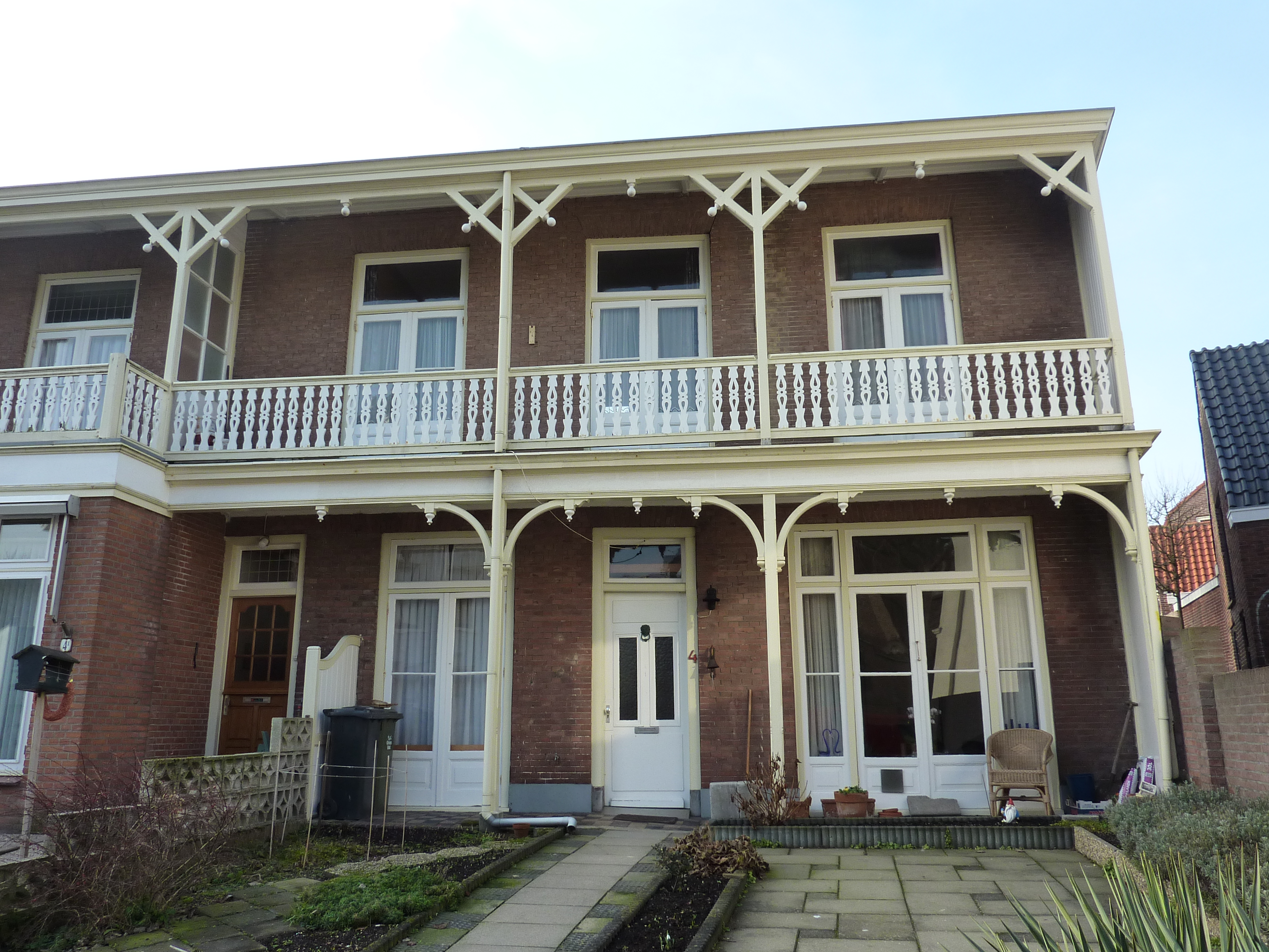 Zandvoort, pensiongebouw, Poststraat 4